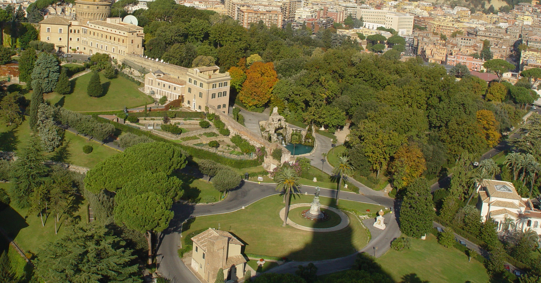 Blick in die Vatikanischen Gärten von der Kuppel des Petersdomes aus fotografiert durch Walter Hochauer, November 2005